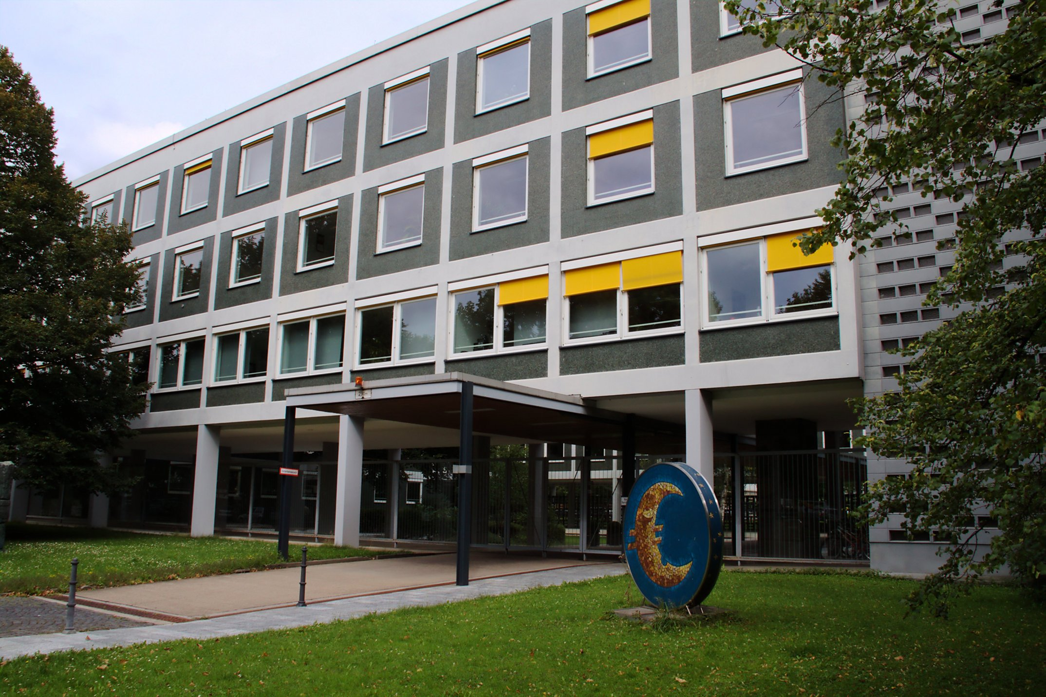 Gebäude des Hessischen Ministeriums der Finanzen in der Friedrich-Ebert-Allee